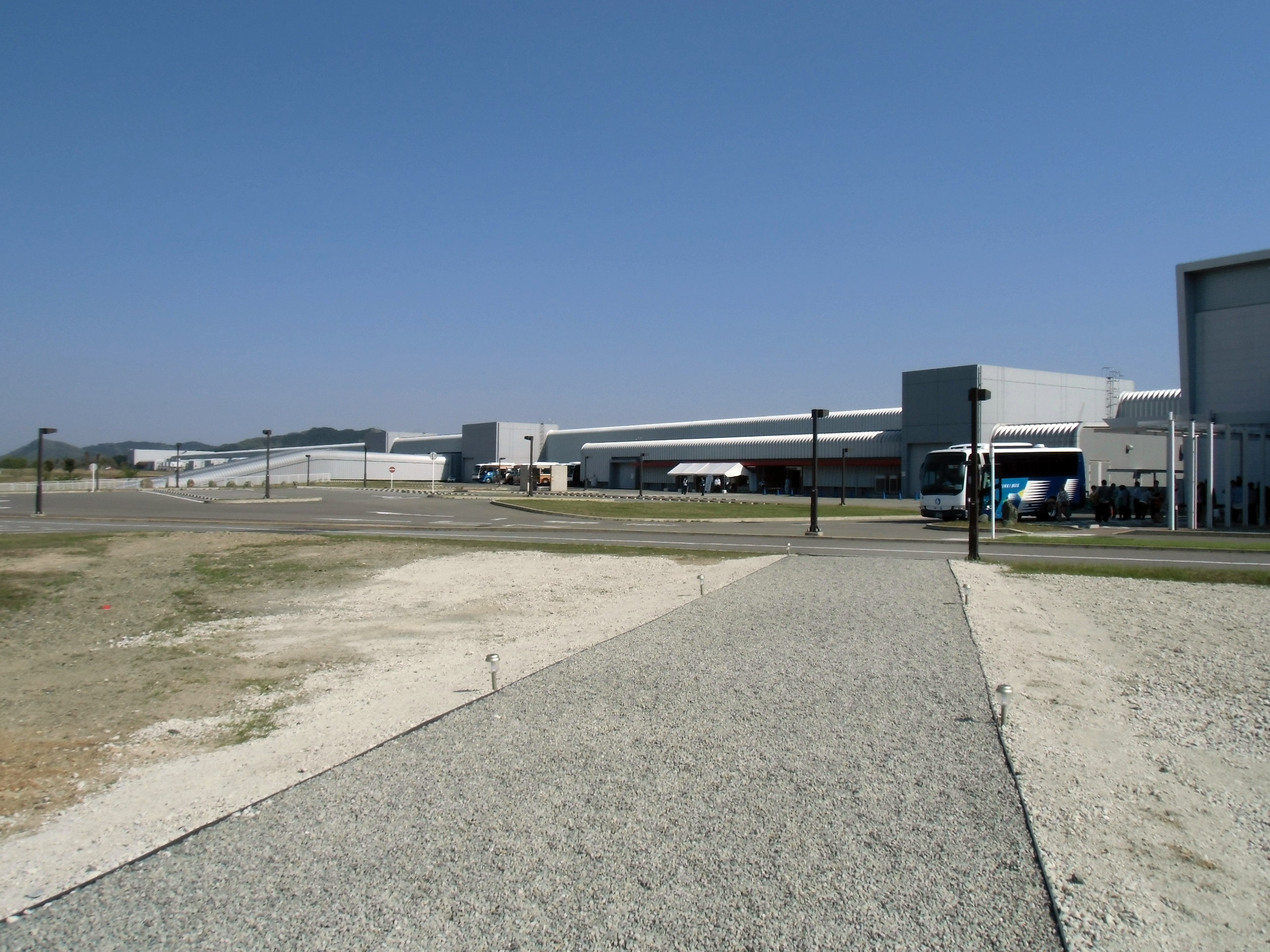 播磨科学公園都市にあるX線自由電子レーザー（XFEL）施設・SACLA全景